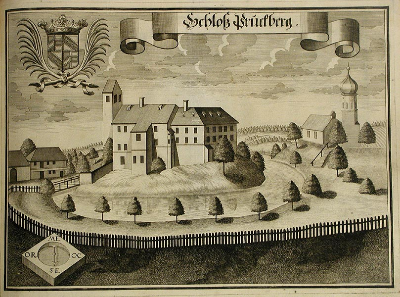 "Schloß Pruckberg" (Schloß Bruckberg), aus : Beschreibung des Churfürsten- u. Hertzogthumbs Ober- und Nidern Bayrn. Rentamt Landshut, Gericht Moosburg, 1723